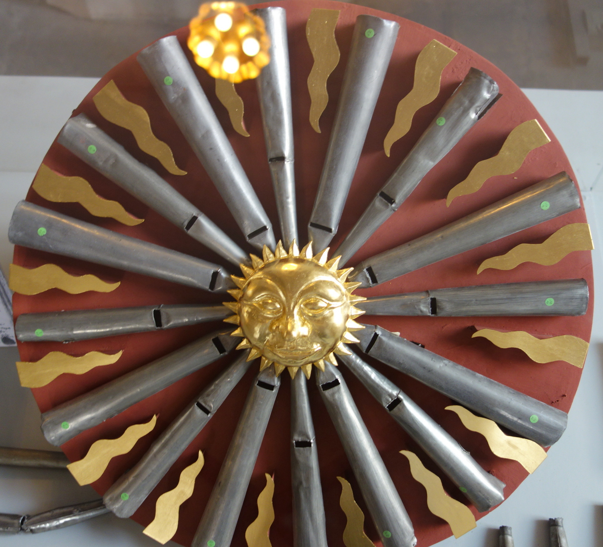 Orgel von St. Peter und Paul, Görlitz, Sachsen, Deutschland